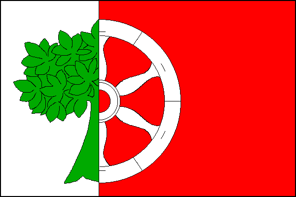 vlajka, Pohoří, okres Rychnov nad Kněžnou